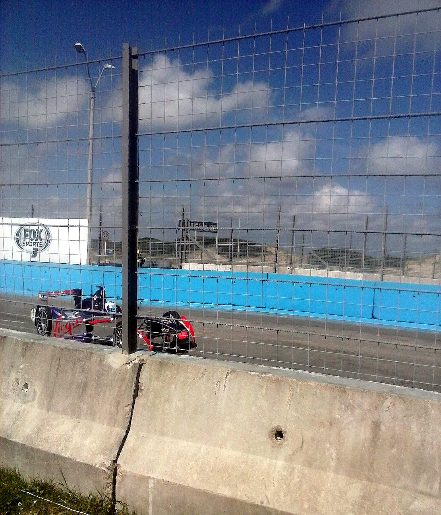 Sam Bird en el ePrix de Punta del Este del 2014, fecha valida por la Formula E.